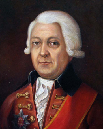 Иван Иванович Мелиссино (1718–1795) — директор Московского университета в 1757–1763 гг.